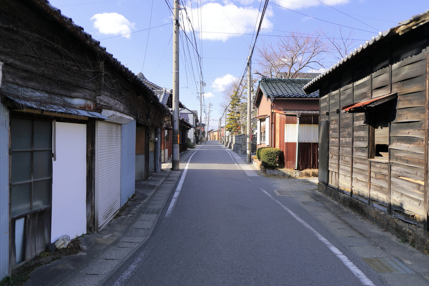 鎌倉街道推定路（豊田市駒場町、2019年（平成31年）1月）